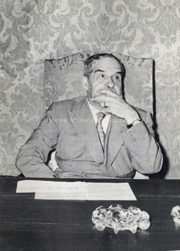 Giuseppe Cenzato, vicepresidente della Societa' meridionale di elettricita', al suo tavolo di lavoro, Napoli 1967